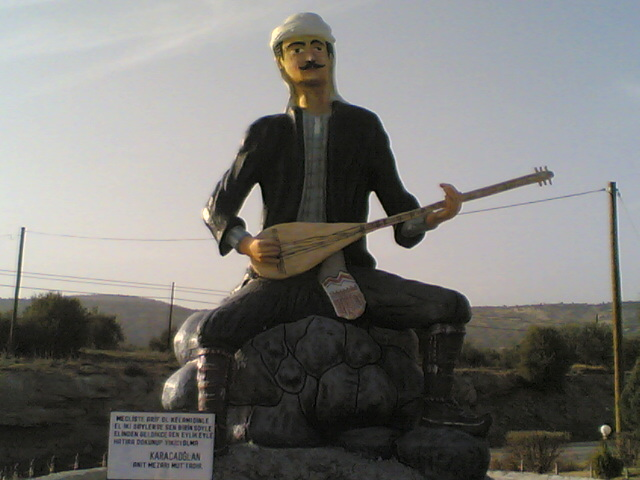 Mut'tan çeşitli görüntüler